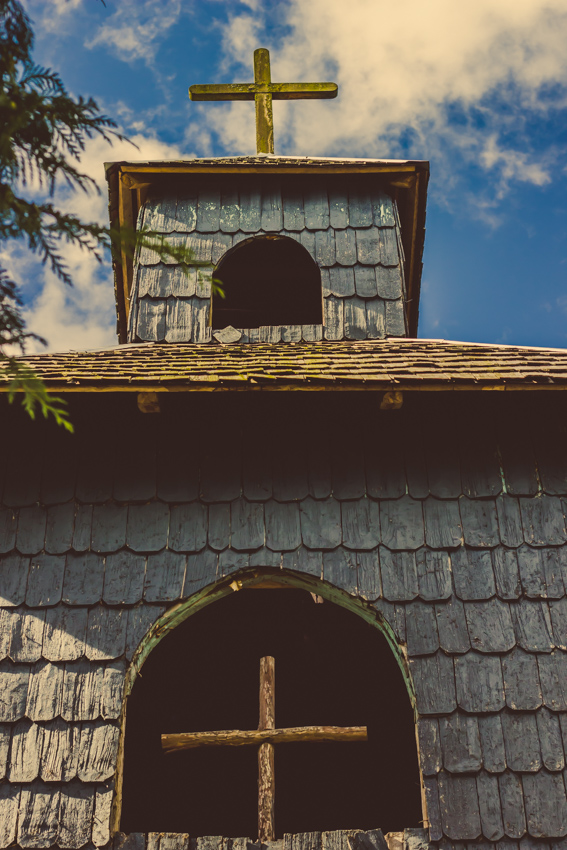 Iglesia de Lourdes, Puyuhuapi, 2013